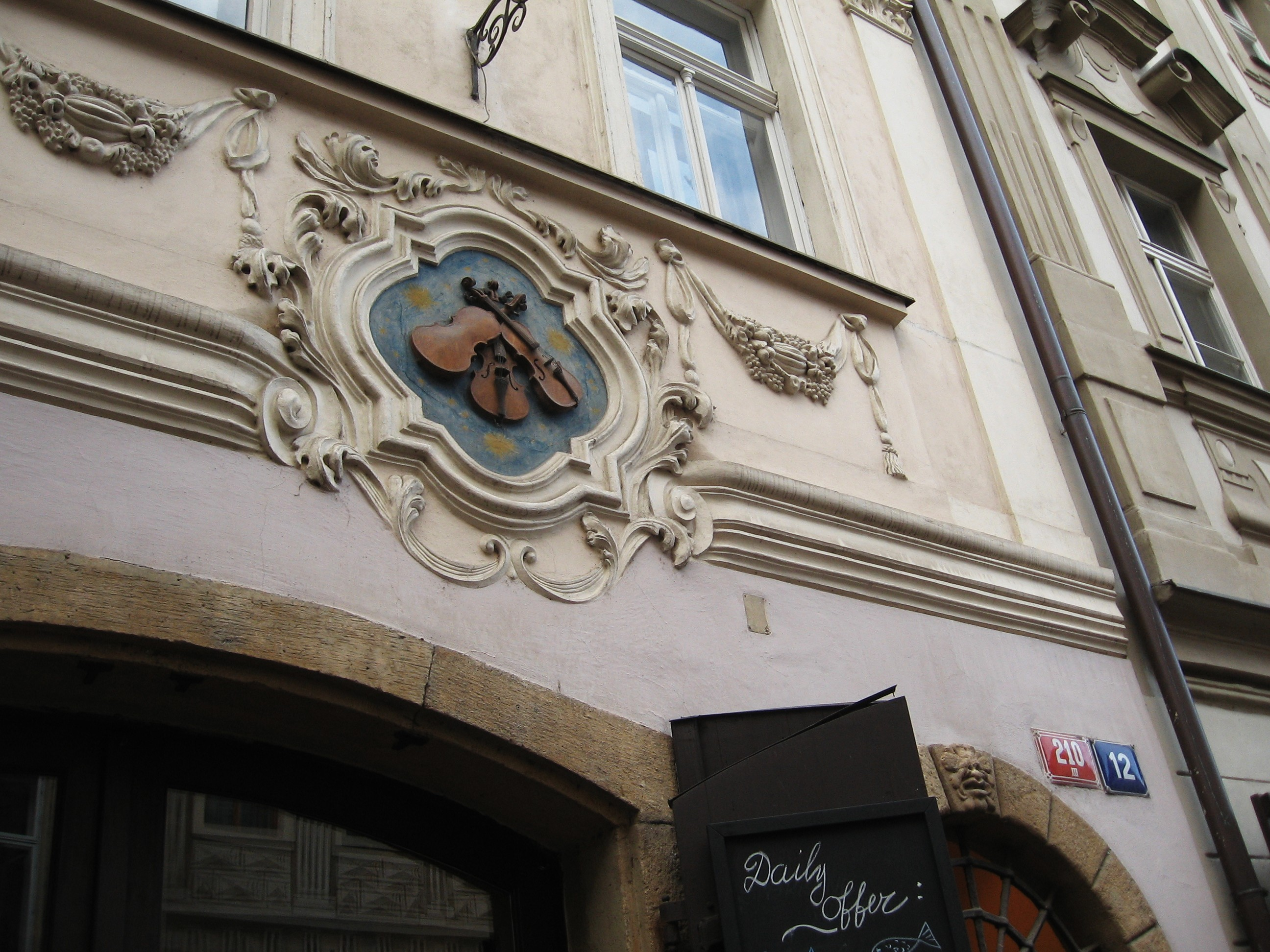 Domovní znamení v Praze, Nerudova 12, U tří housliček